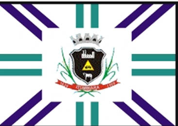 Bandeira de Itumbiara